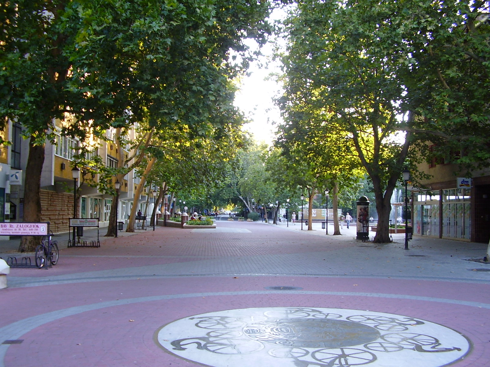 A képen Békéscsaba sétálóutcája látható a Haán Lajos utca becsatlakozásától a Csaba Center felé. A kép 2006 nyarán készült.